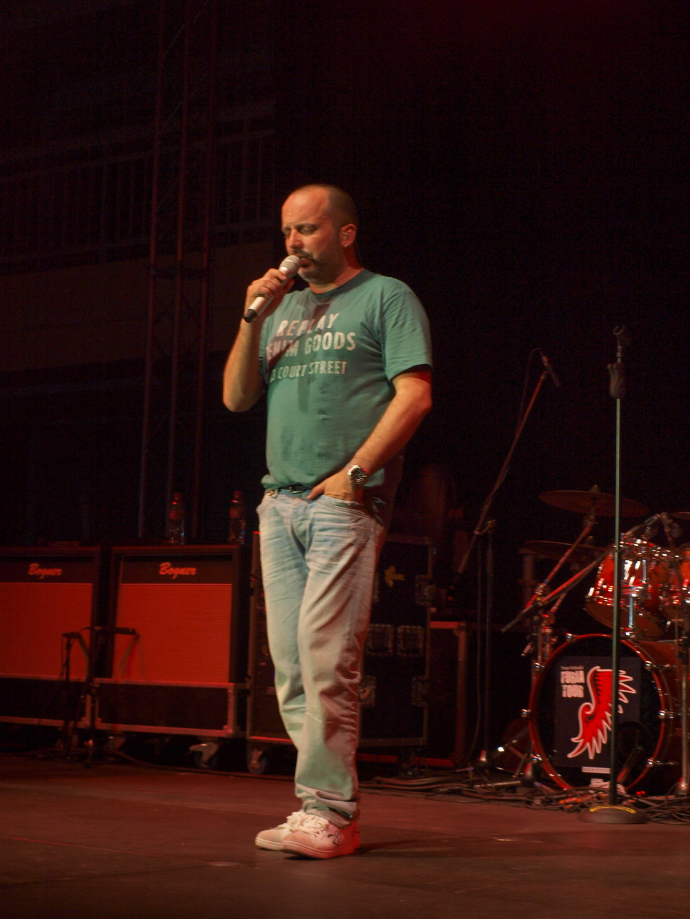 Koncert Tonija Cetinskog u Slavonskom Brodu (17. travnja 2010.)